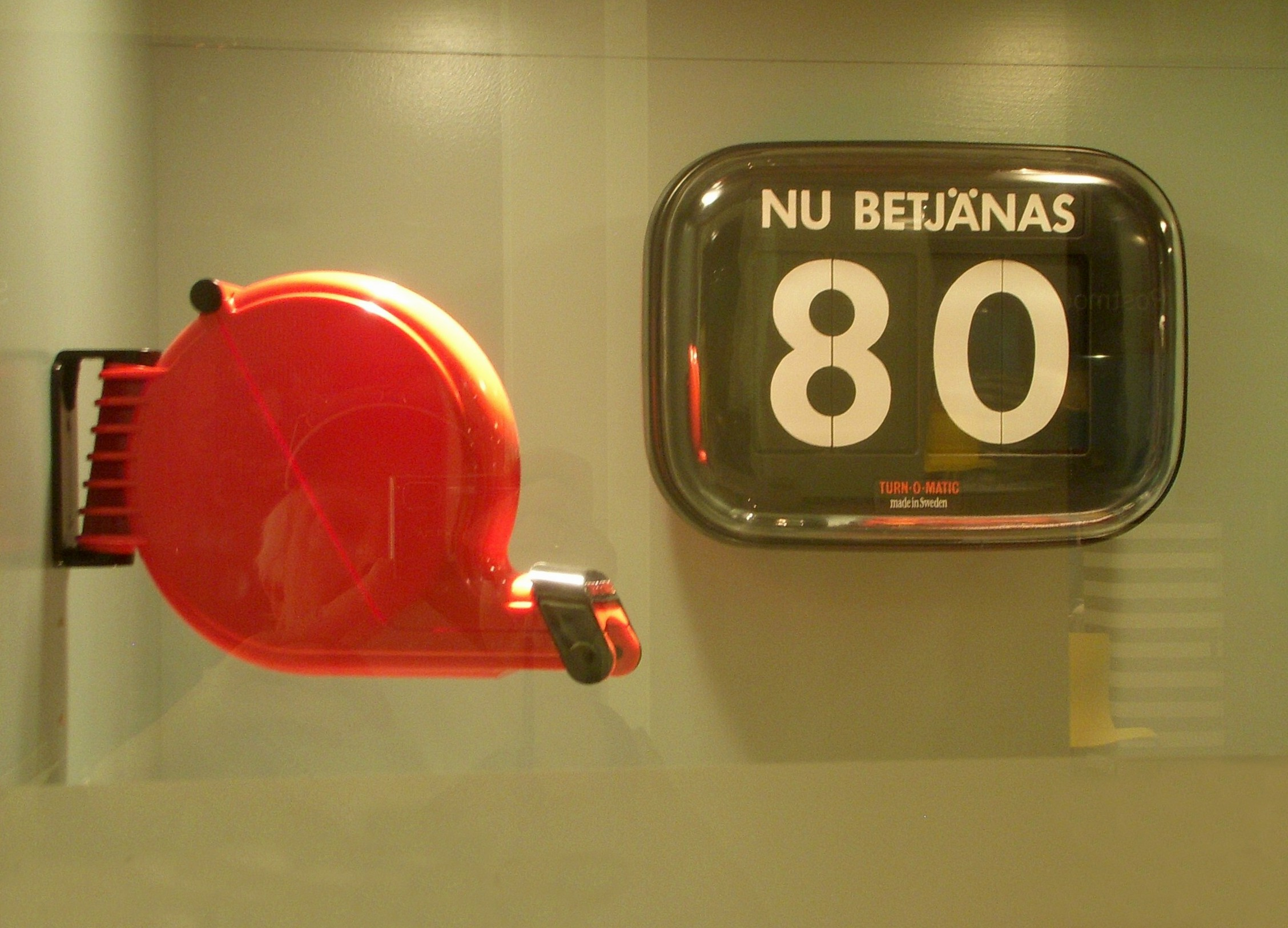 Könummersystemet "Turn-O-Matic", A&E Design